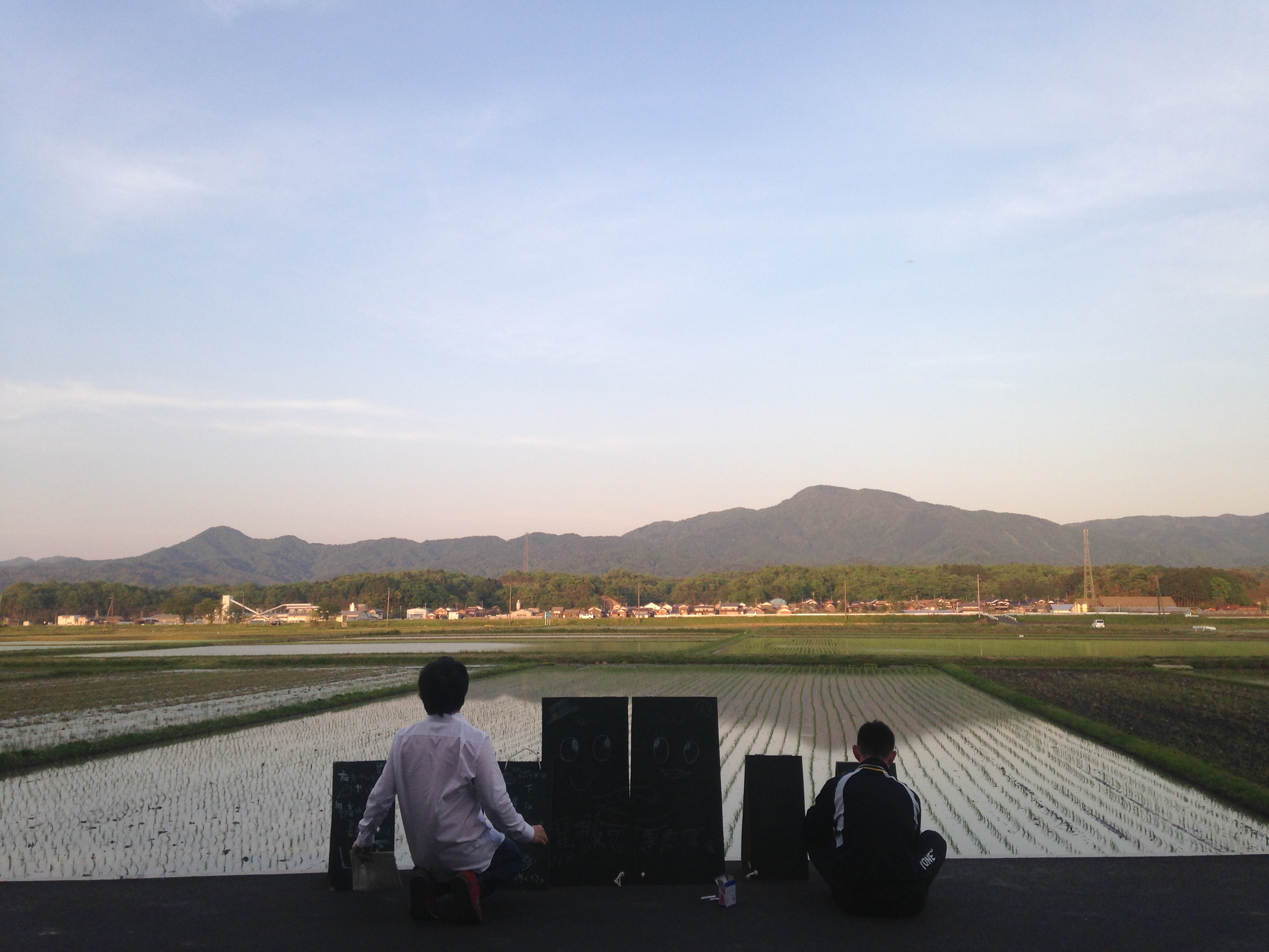 京都府京丹後市弥栄町和田野の施設「古与曾」からみる弥栄平野と金剛童子山